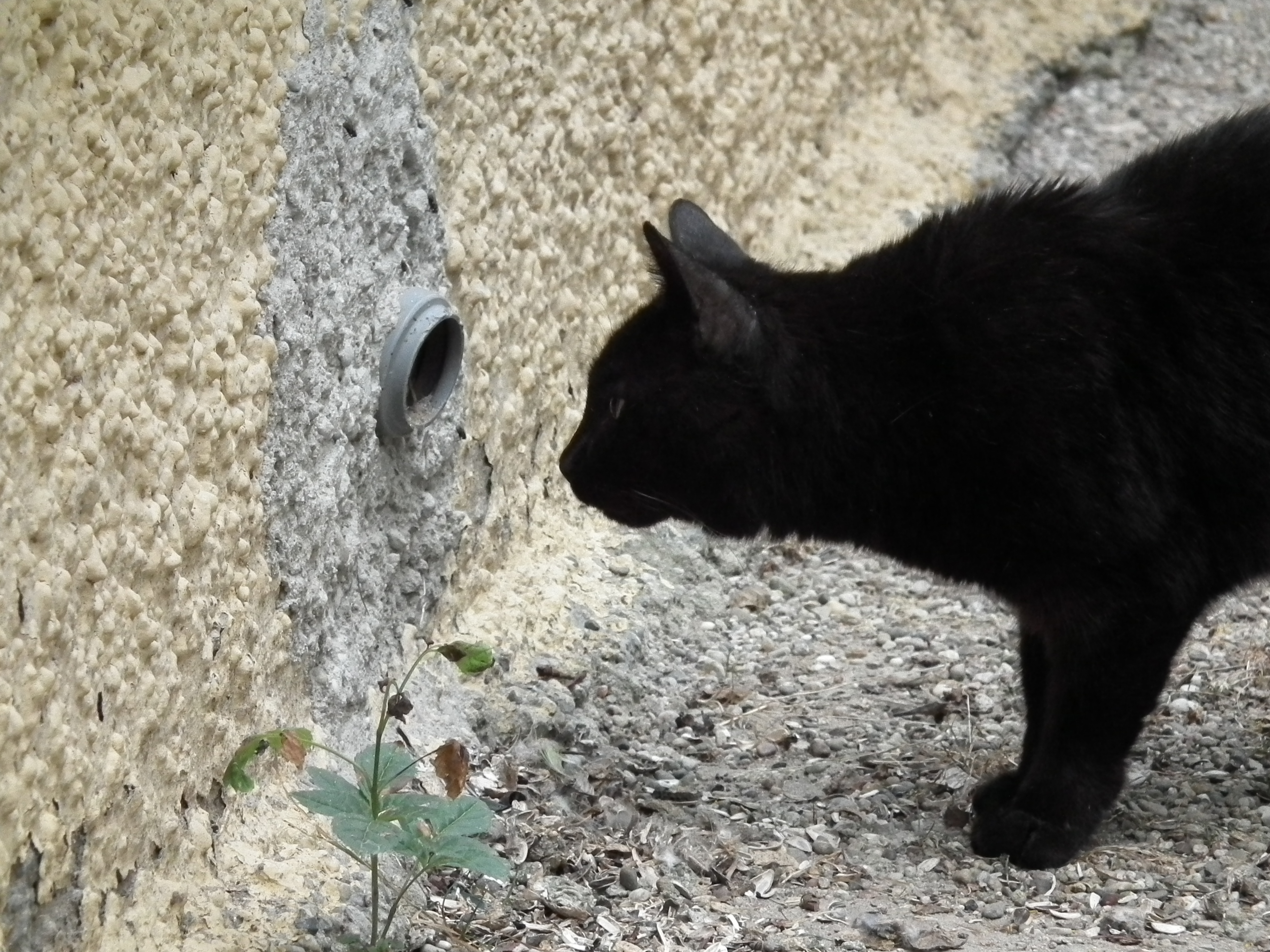 Schwarzer Kater lautert vor einem Loch in einer Wand, fotografiert in Baden-Württemberg (Deutschland)